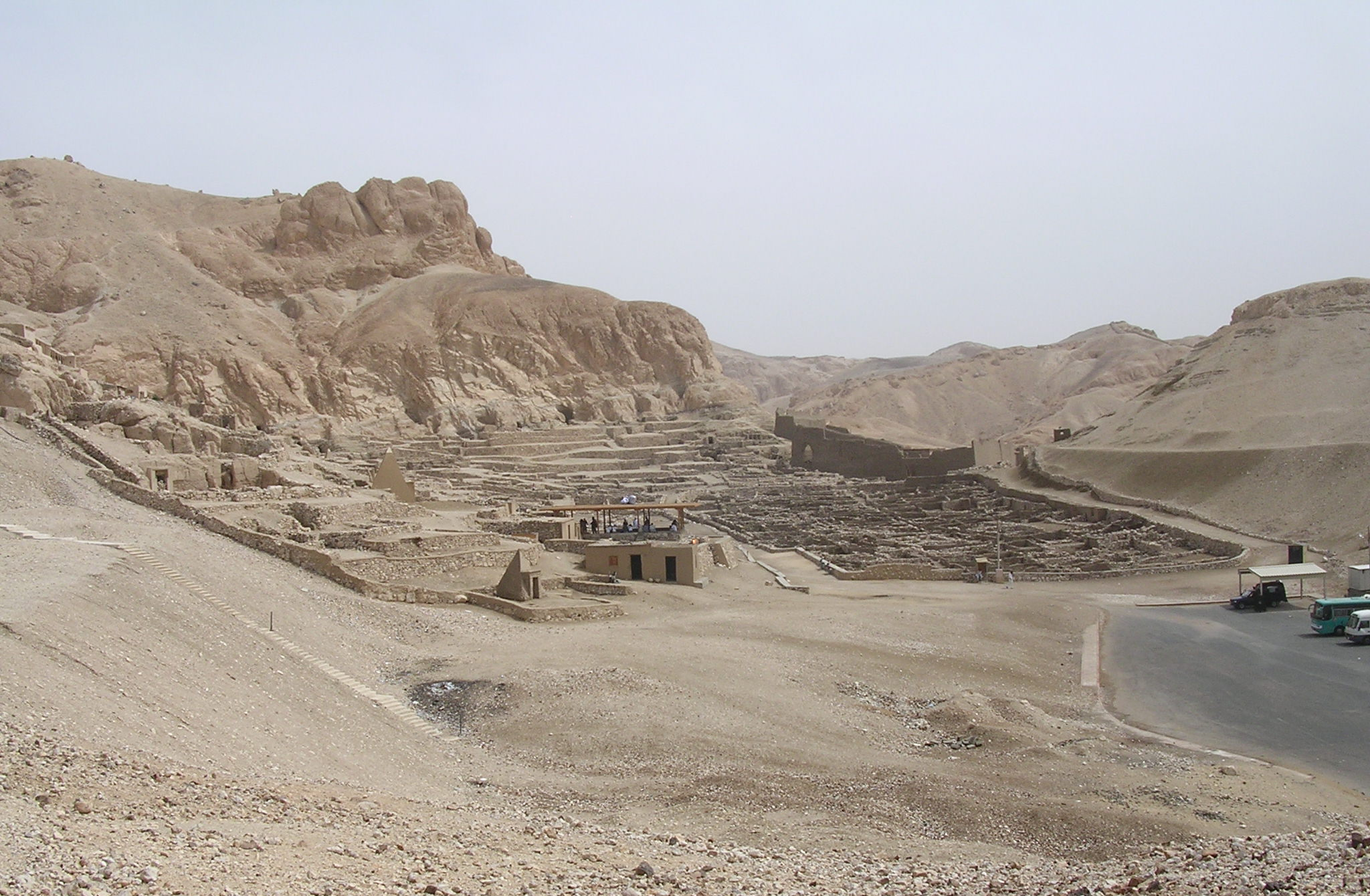 Dejr el-Medine (Luxor, Egyiptom)